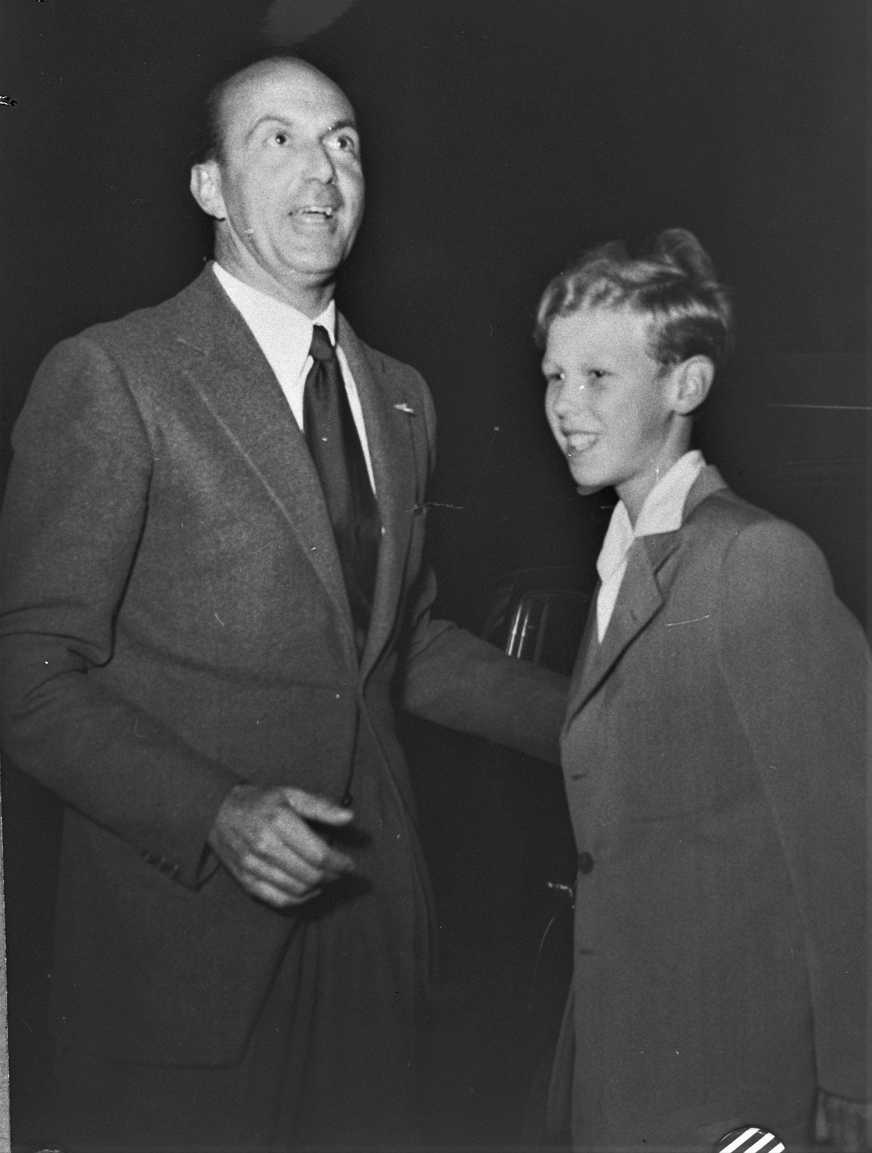 Collectie / Archief : Fotocollectie Anefo Reportage / Serie : [ onbekend ] Beschrijving : ex koning Umberto in zwitserland. Begroeting door ex kroonprins Victor Emanuel Datum : 5 oktober 1949 Locatie : Zwitserland Trefwoorden : koningen, kroonprinsen Persoonsnaam : Umberto II, (ex)koning van Italië, Victor Emanuel, (ex)prins van Italië Fotograaf : Merk, Ben / Anefo Auteursrechthebbende : Nationaal Archief Materiaalsoort : Glasnegatief Nummer archiefinventaris : bekijk toegang 2.24.01.09 Bestanddeelnummer : 903-6388